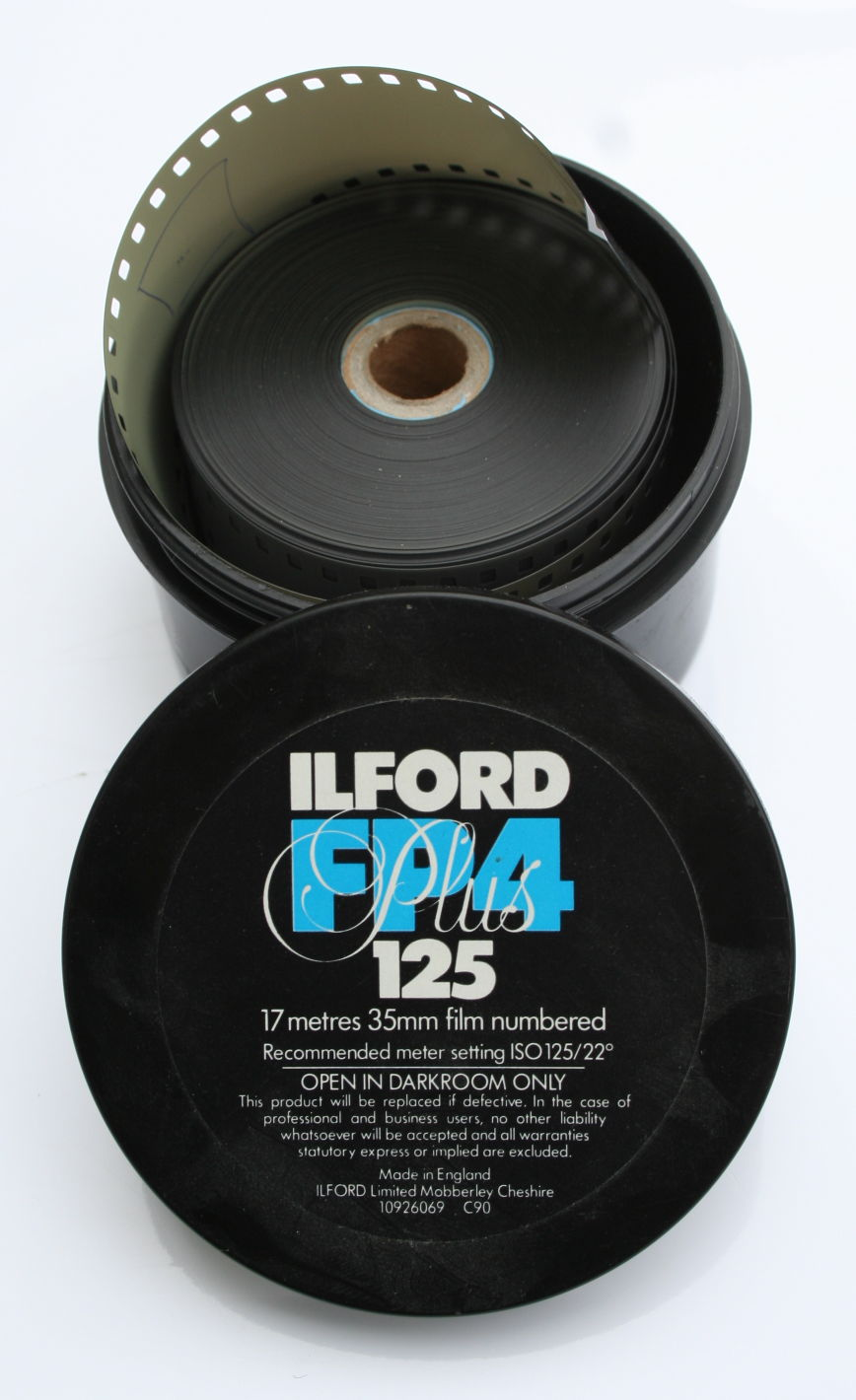 Meterware 35-mm-Film